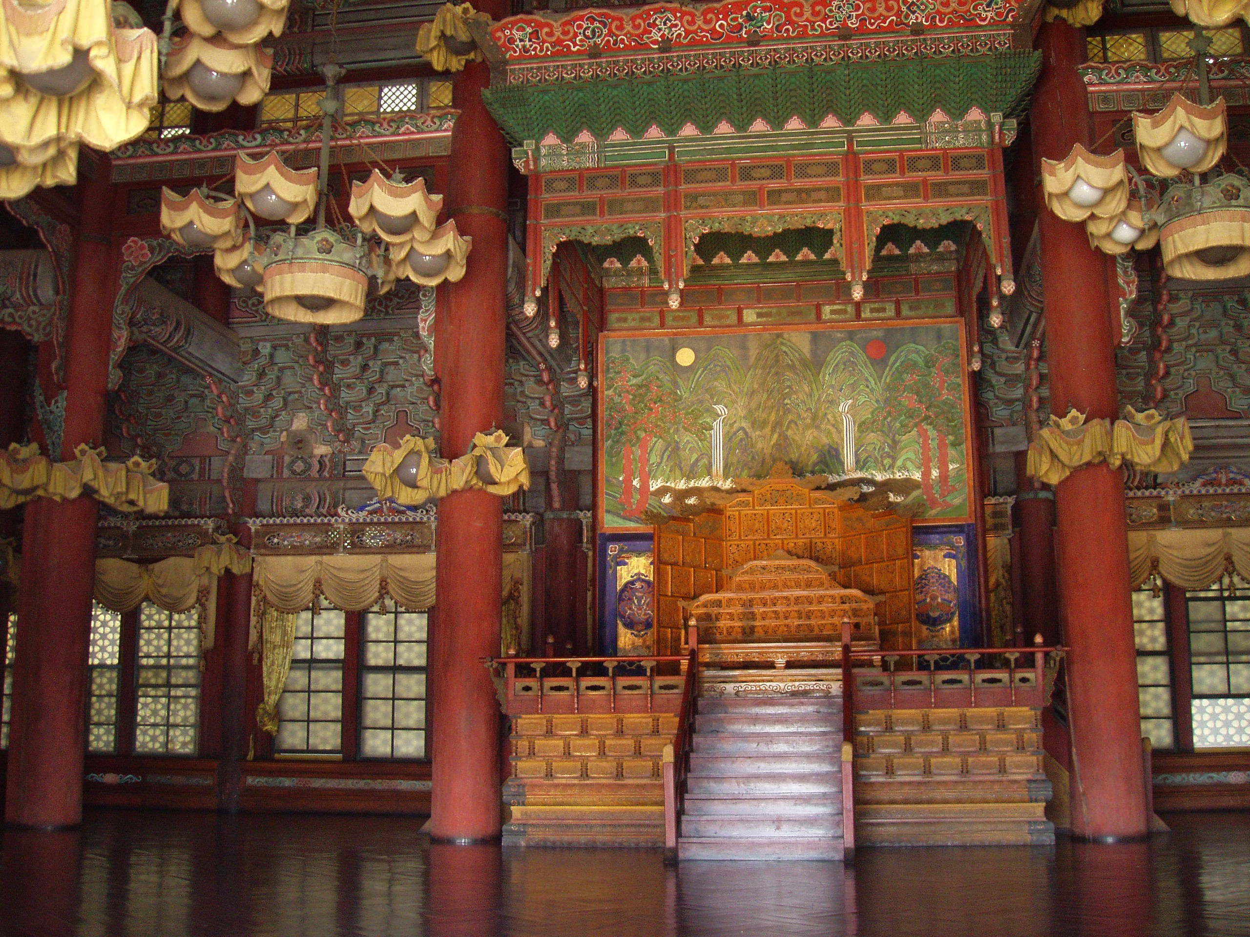 Injeongjeon (interior), Changdeokgung - Seoul, Korea.